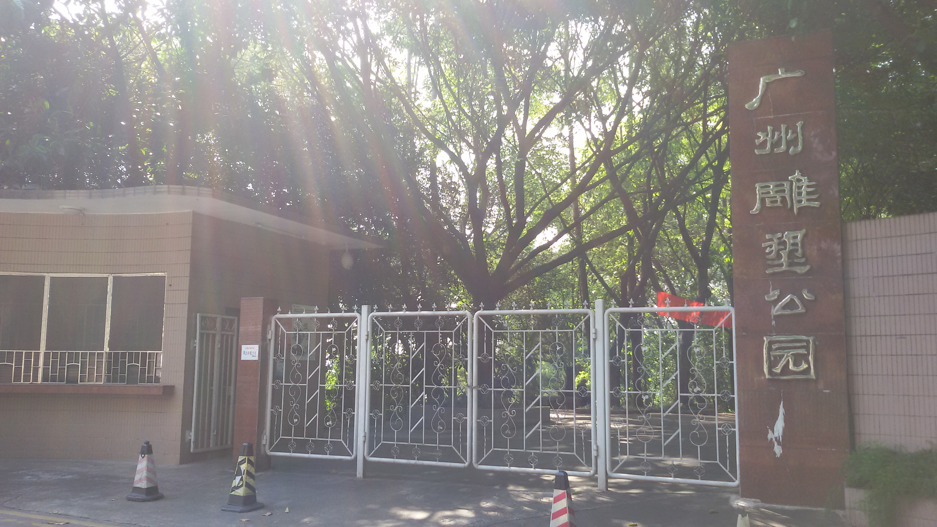 粵語: 广州雕塑公园嘅东门